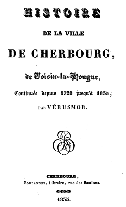 Couverture de l'Histoire de la ville de Cherbourg par Voisin-La-Hougue et Vérusmor